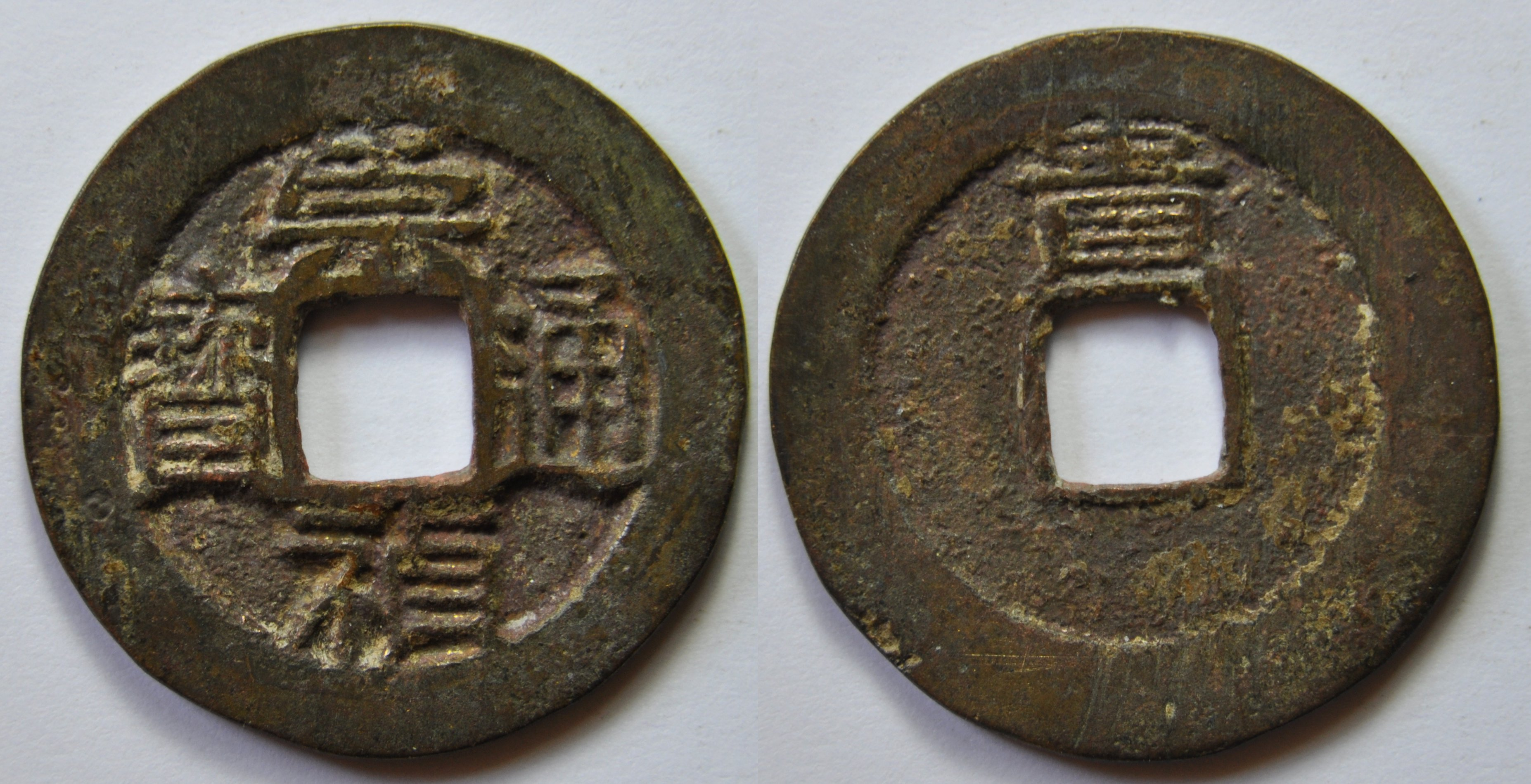 Une monnaie en laiton d'une sapèque (1 cash) de l'empereur Si Zong (1628-1644), ère Chong Zhen de la dynastie Ming (1368-1644). C'est le dernier empereur de cette dynastie. A/ Chong Zhen tong bao (Monnaie courante de Chong Zhen) R/ Gui pour l'atelier de Guizhou (Province du Sud de la Chine à côté du Yunnan) Dimension : 25,09 mm Poids : 3,5 g. Référence : H20.296 Indice de rareté : 14 (Très commune d'après D.Hartill) Remarque : Cette monnaie est d'un bon état et d'un poids correct pour l'époque. Ce n'est pas une fausse monnaie. Ce dernier empereur a introduit des punitions pour l'utilisation de la fausse monnaie à la fin de l'année 1643 : trente coups pour l'utilisation d'une fausse monnaie, la décapitation pour celui qui est découvert avec 4 fausses monnaies ou plus.